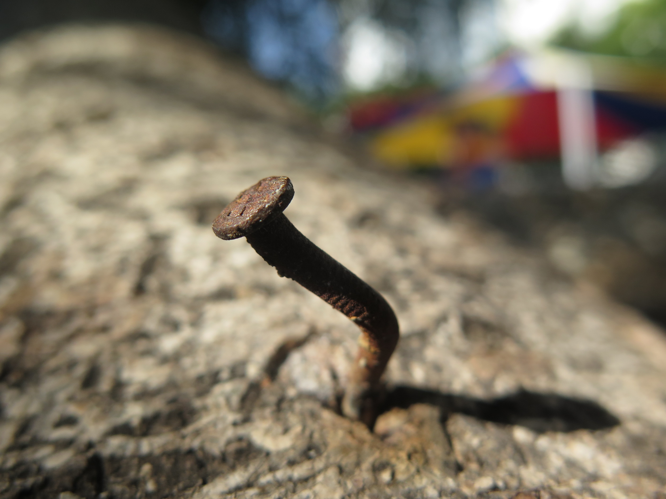 מסמר נעוץ